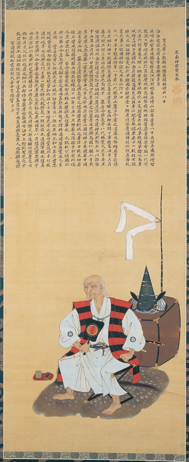 松井興長の肖像。